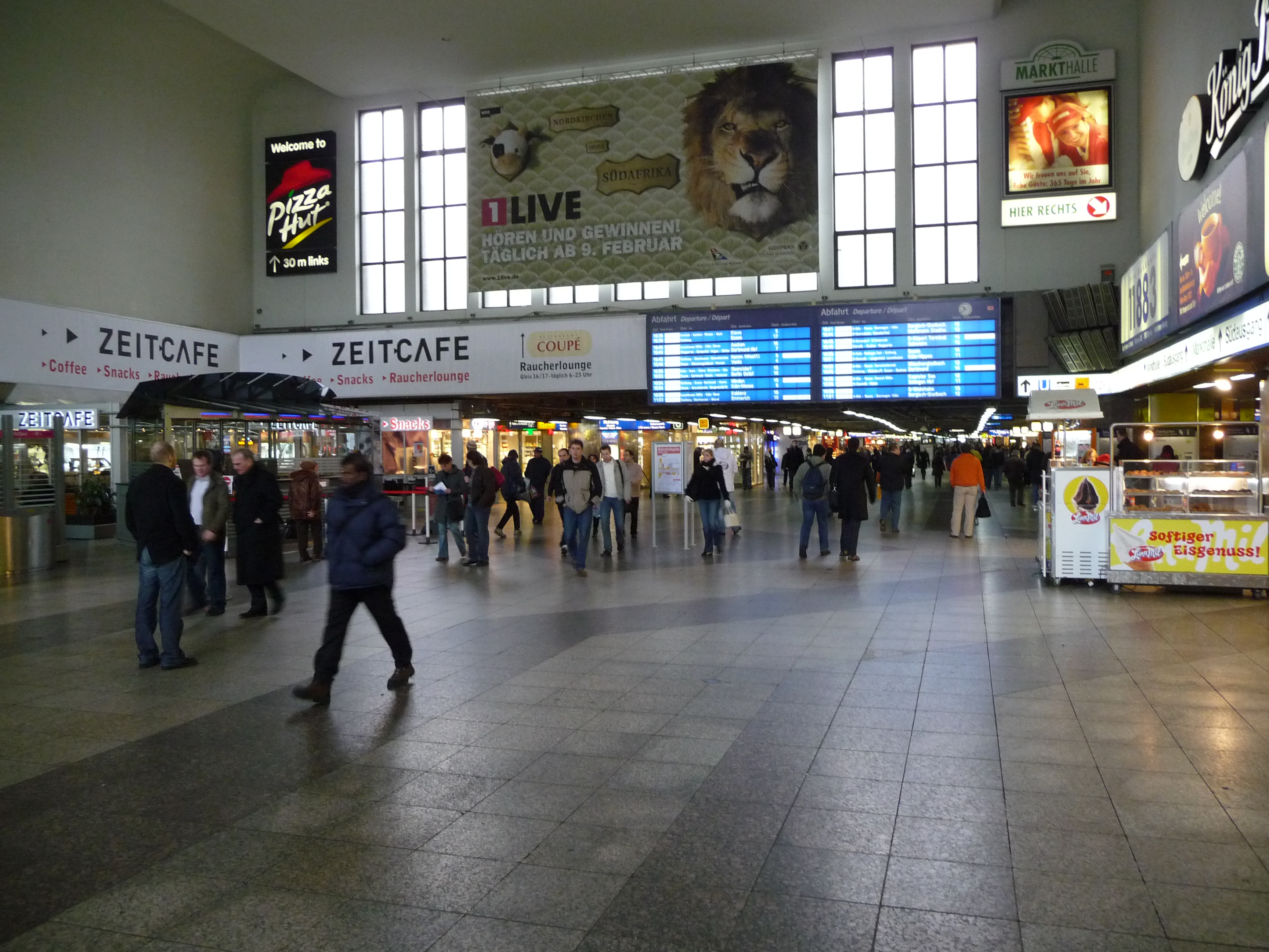 Siehe Name